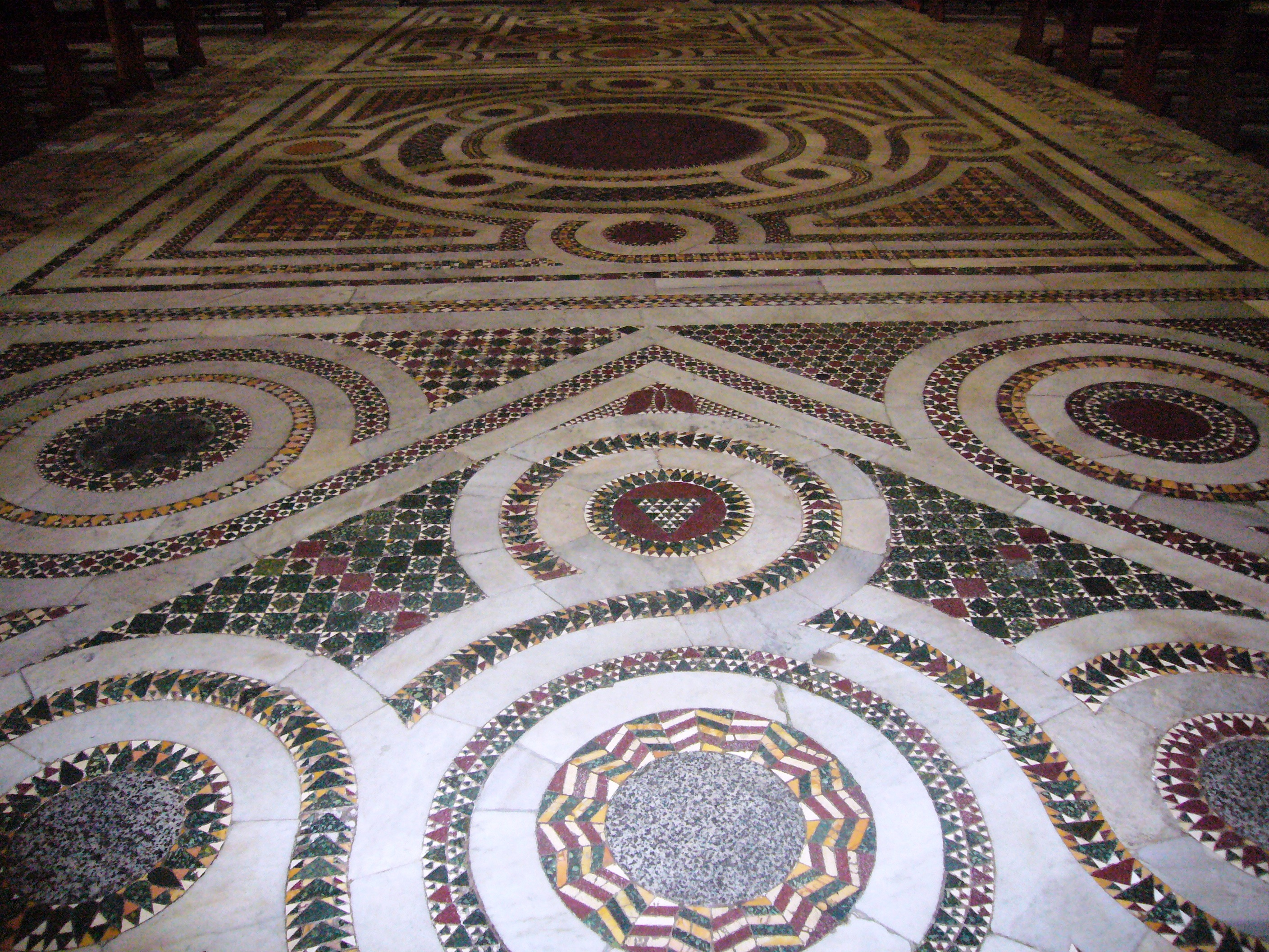 Roma, Basilica di san Crisogono in Trastevere: pavimento cosmatesco